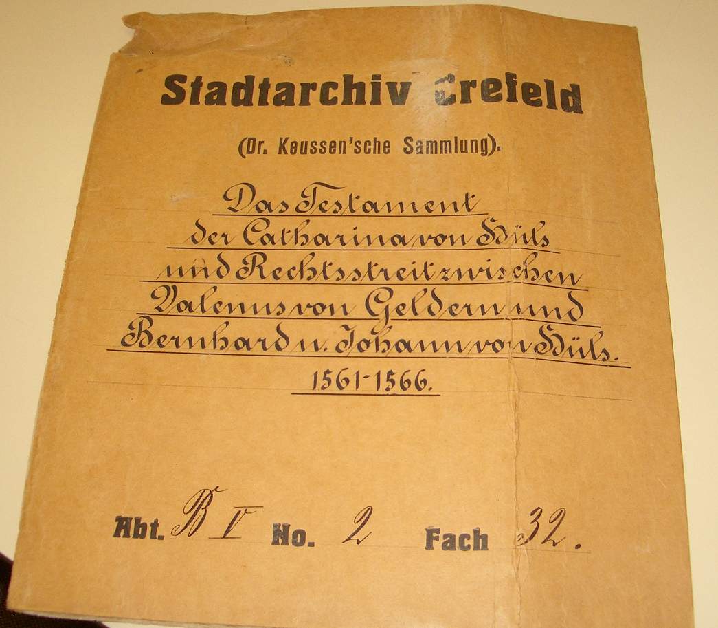 Testament der Catharina von Hüls - verwendet im Erbstreit Valenus von Geldern 1561